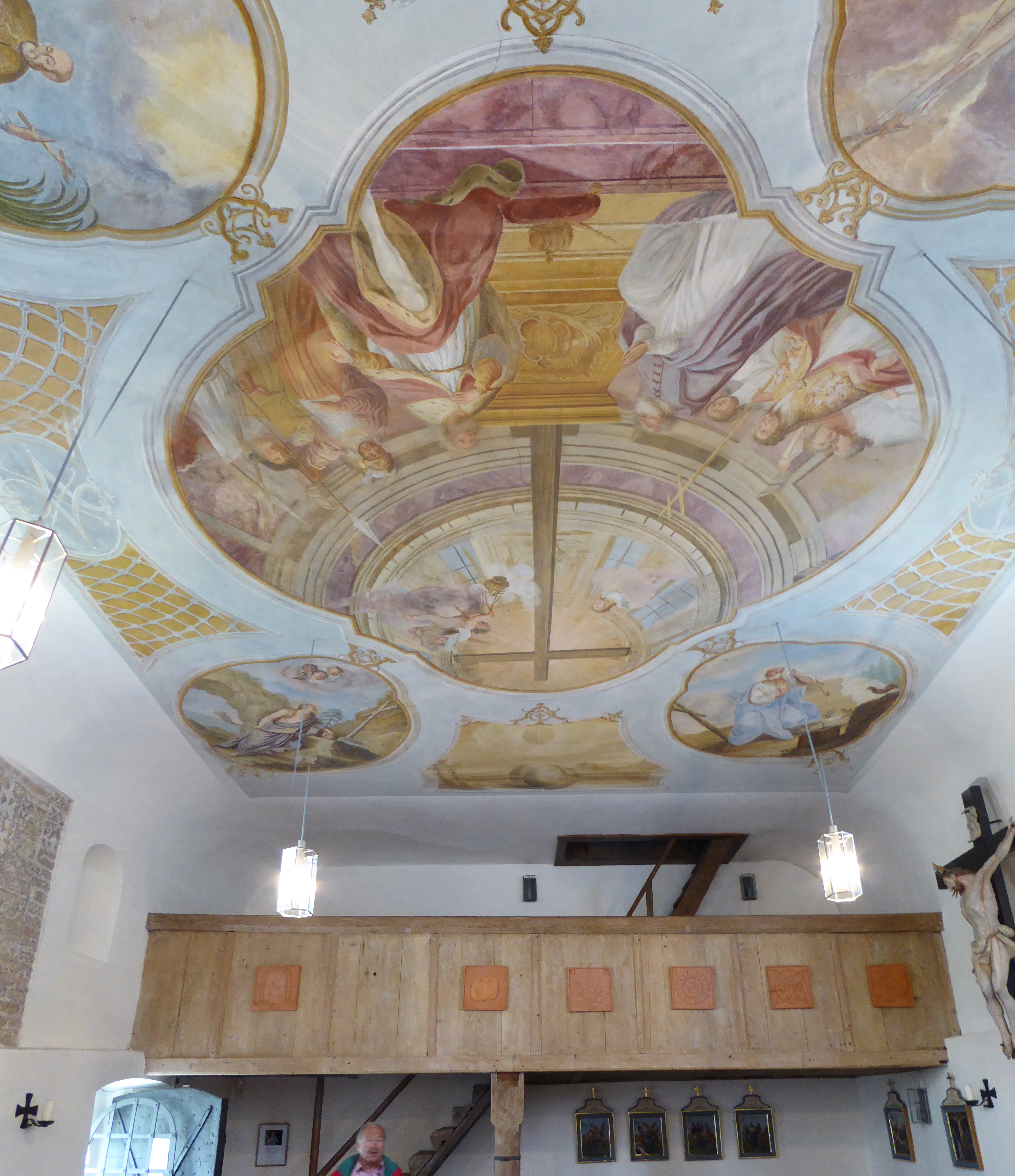 Empore und Deckengemälde